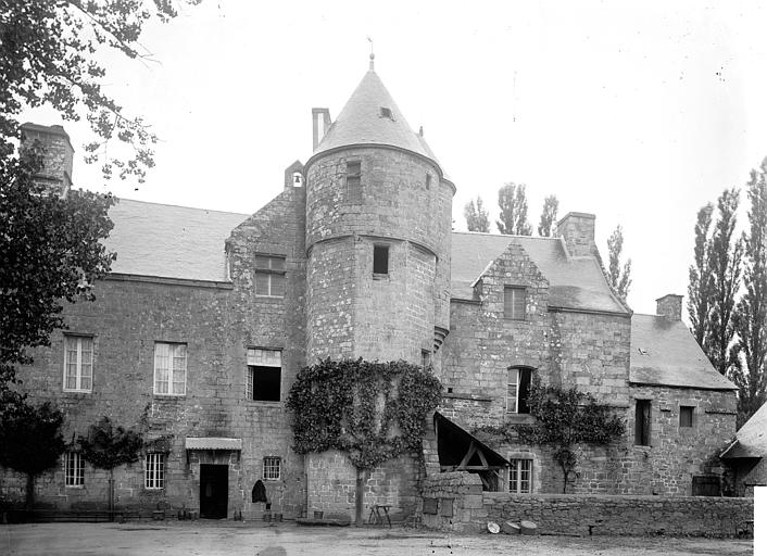 L'abbaye Sainte-Croix à Guingamp photographiée par Camille Enlart